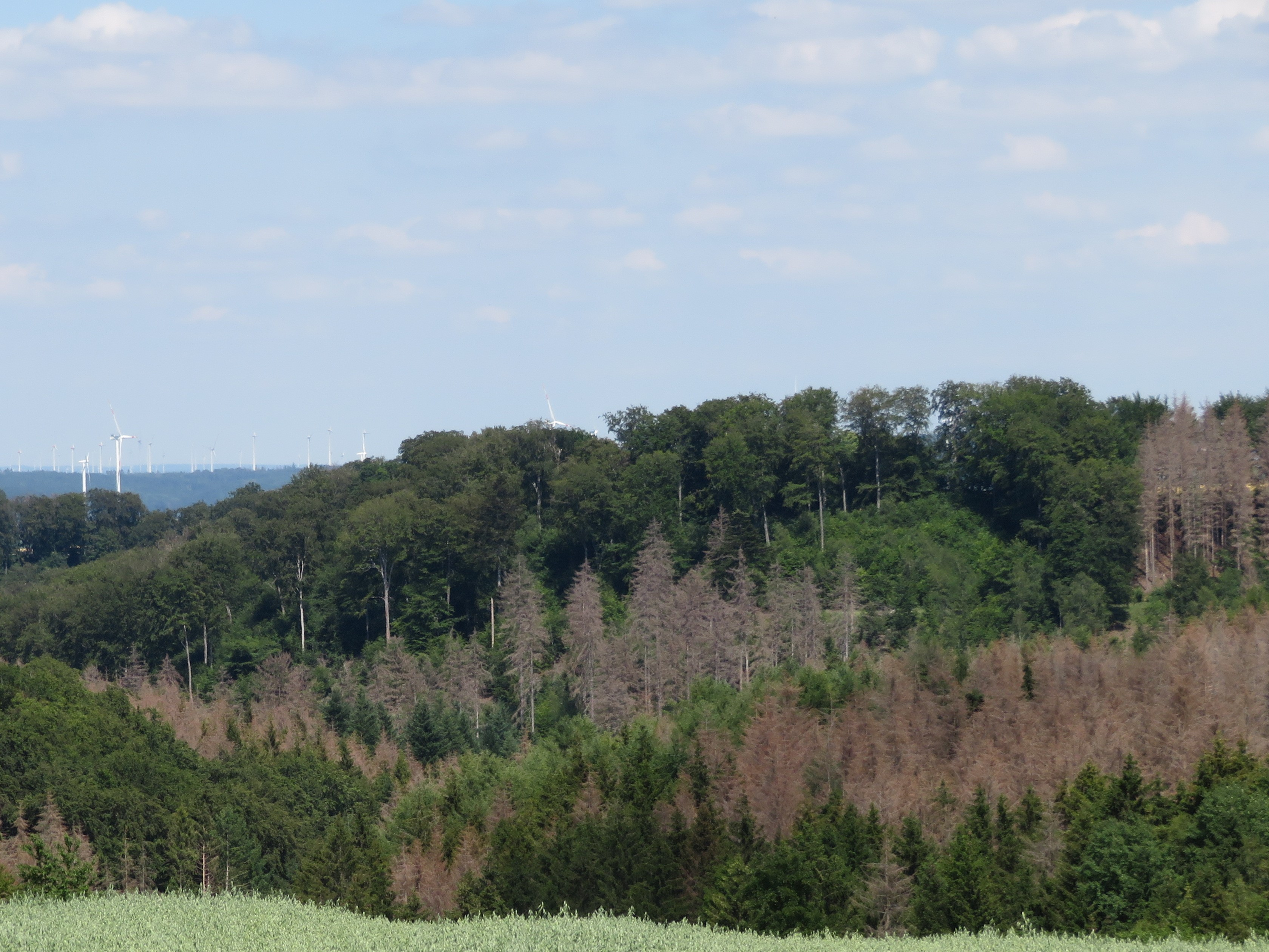 ​Landschaftsschutzgebiet Büren-Wünnenberger Wälder an der westlichen Kreis Grenze bei Knebelinghausen.